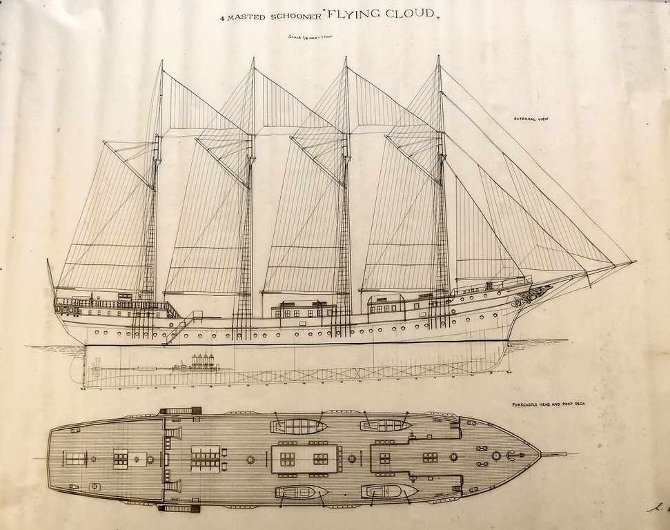 Disegno su lucido del Flying Cloud, yacht a 4 alberi maestri. Vista esterna e piano di coperta, 1927 (AS Livorno, Cantiere navale Luigi Orlando, Disegni Tecnici)